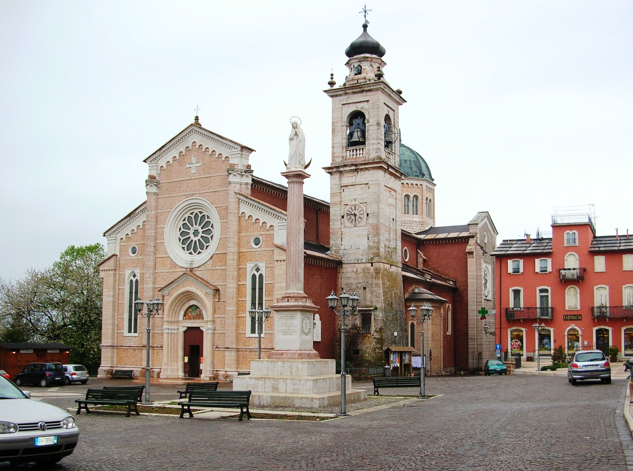 Piazza di Boscochiesanuova